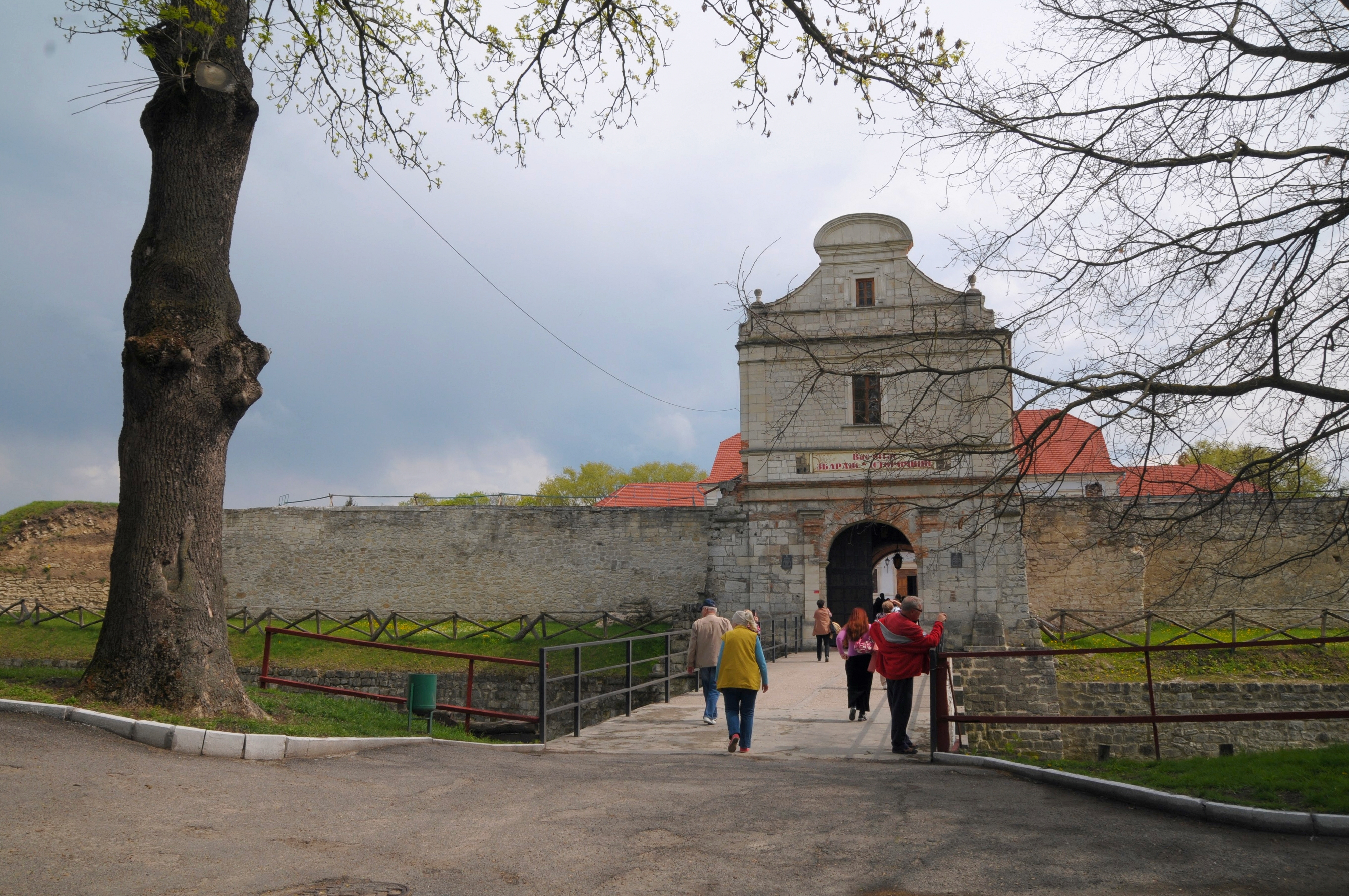 Замок у Збражі